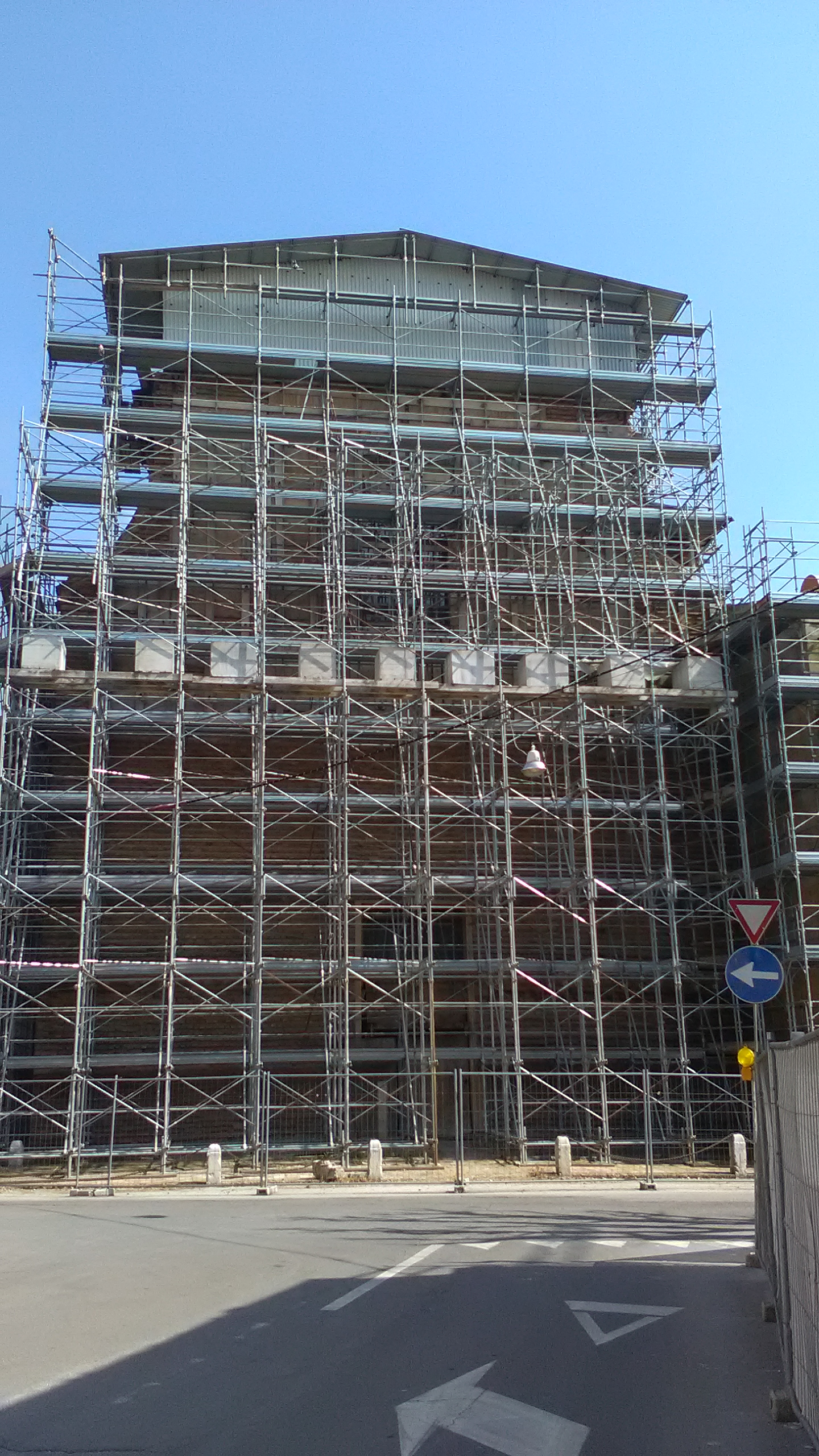 La chiesa del Gesù a Mirandola nel marzo 2016